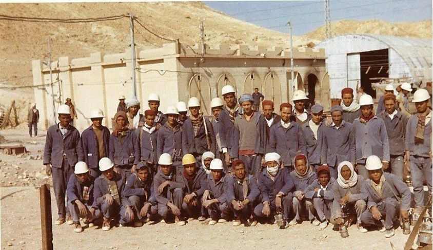 Equipe d'ouvriers Compagnie des Phosphates de Gafsa en 1969